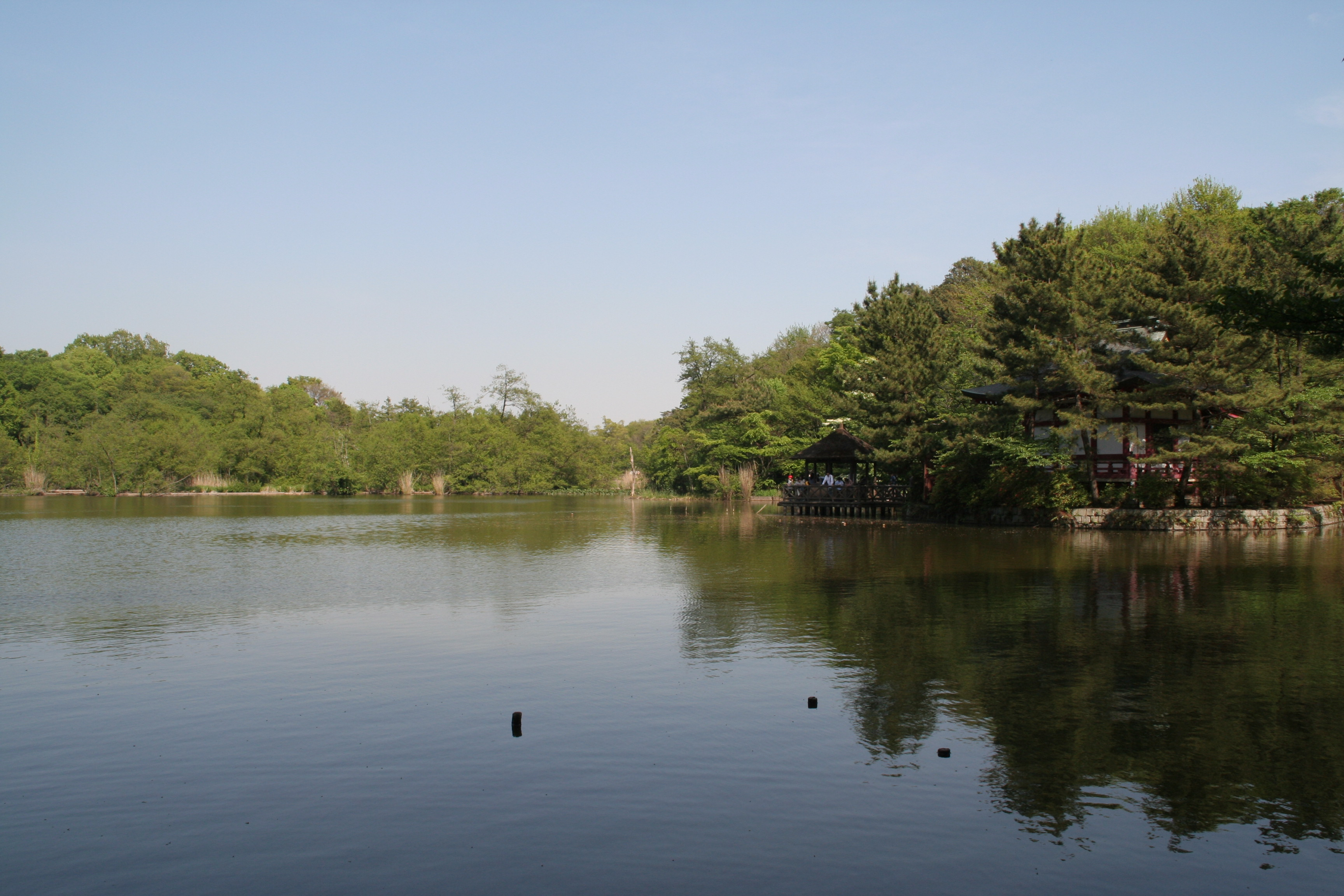 Shakujii Park Sampoji pond